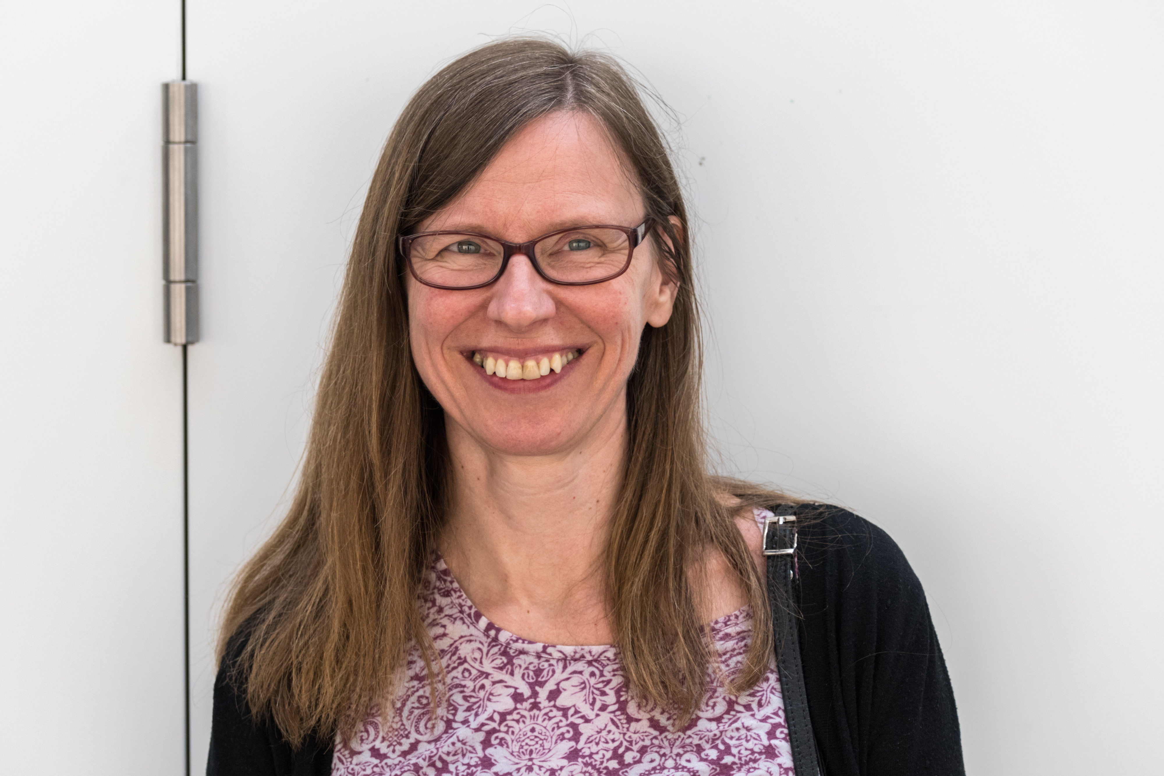 Edith Stauber bei Crossing Europe 2019 in Linz